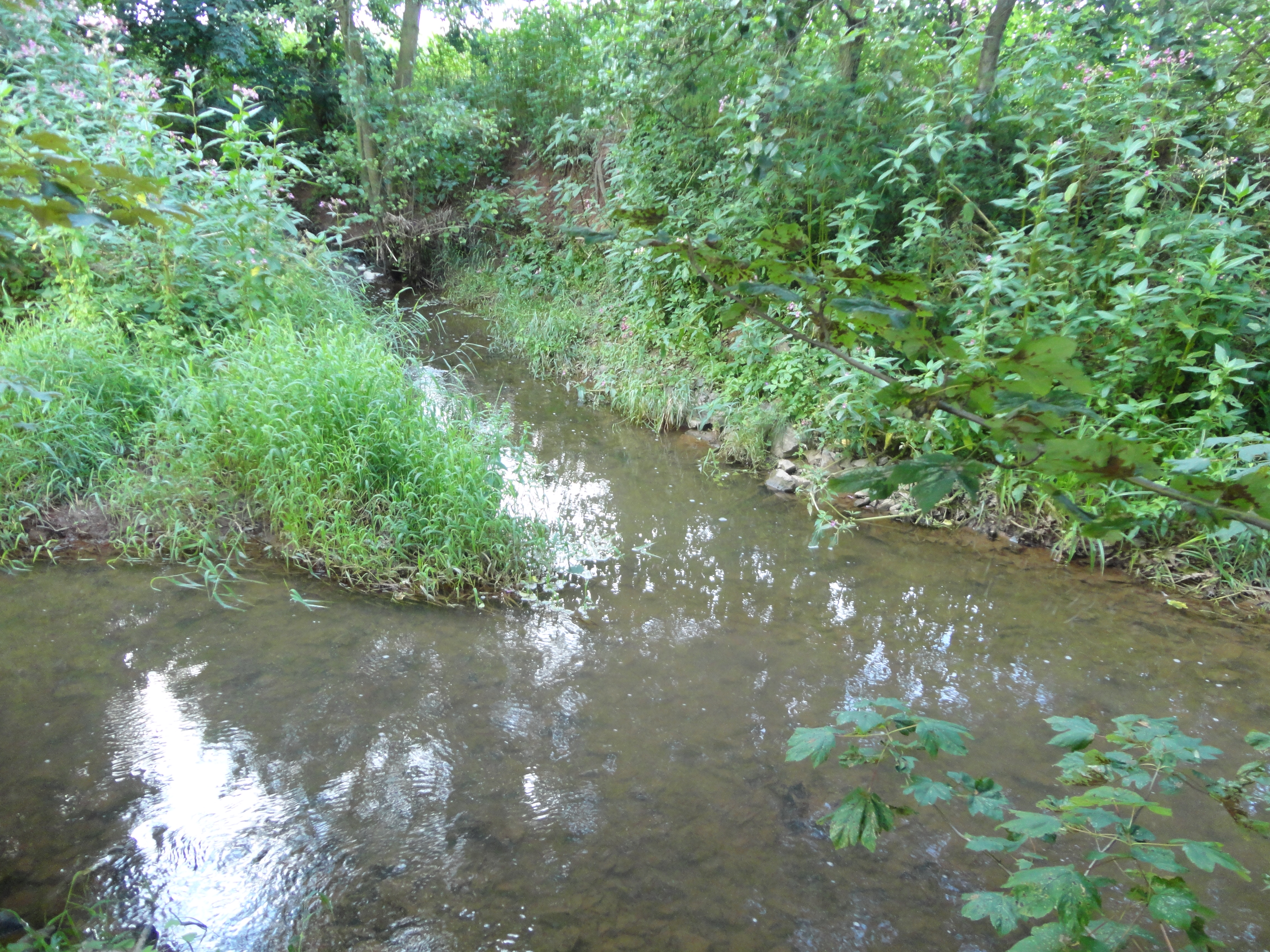 Mündung der Ichte in die Helme